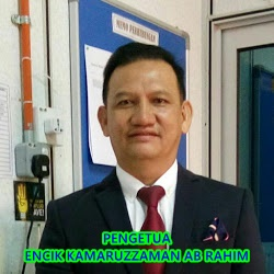 PENGETUA SMAAT